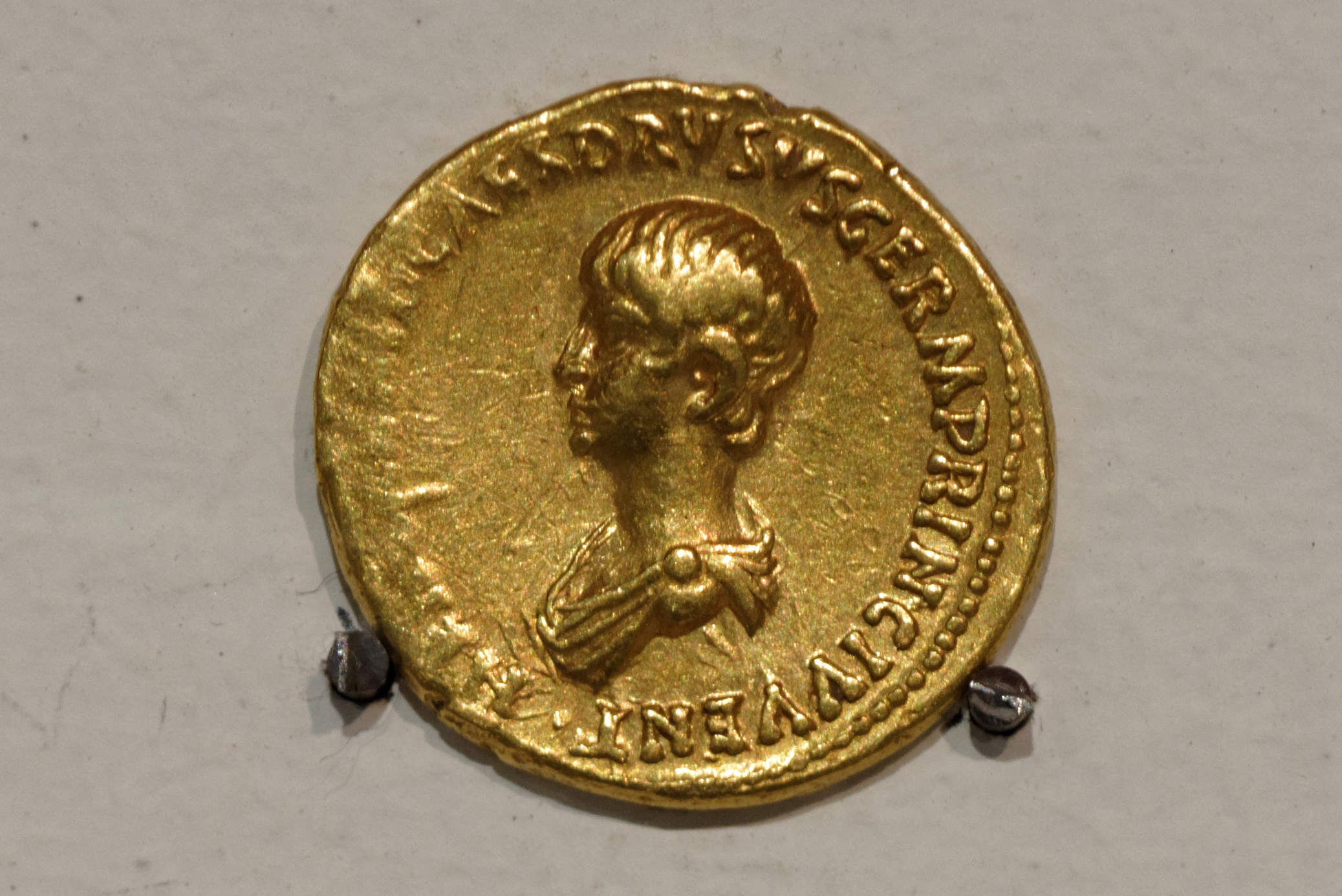 Aureus D/ NERO CLAVD CAES DRVSVS GERM PRINC IVVENT Buste de Néron, comme prince de la jeunesse (PRINC IVVENT). R/ SACERD COOPT IN OMN CONL SVPRA NVM EX S C. Trépied, simpulum, lituus et patère. Musée des Beaux-Arts de Lyon, inv. X 618-18